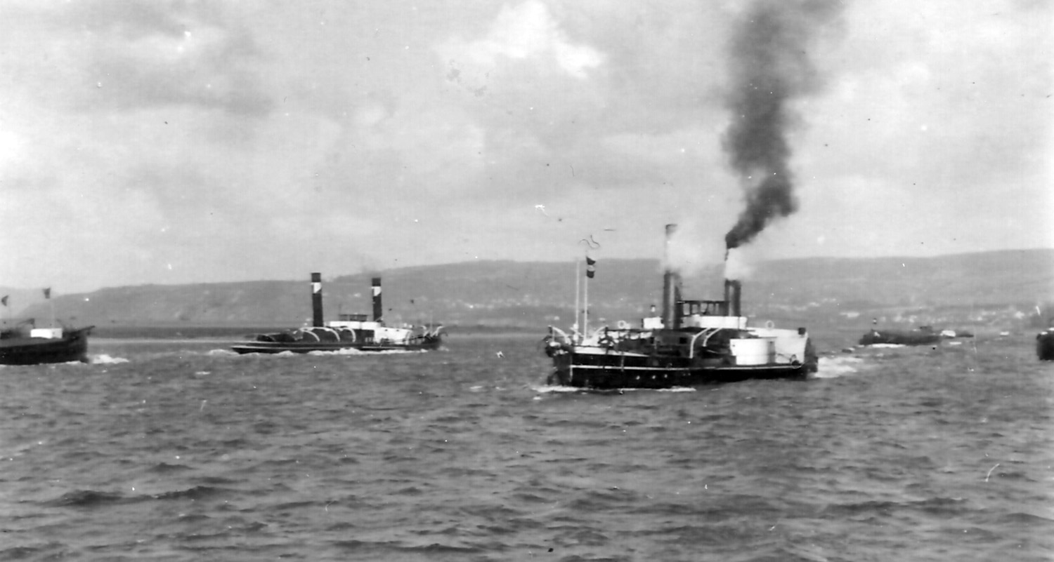 Begegnung zweier Schleppzüge auf dem Rhein bei Neuwied